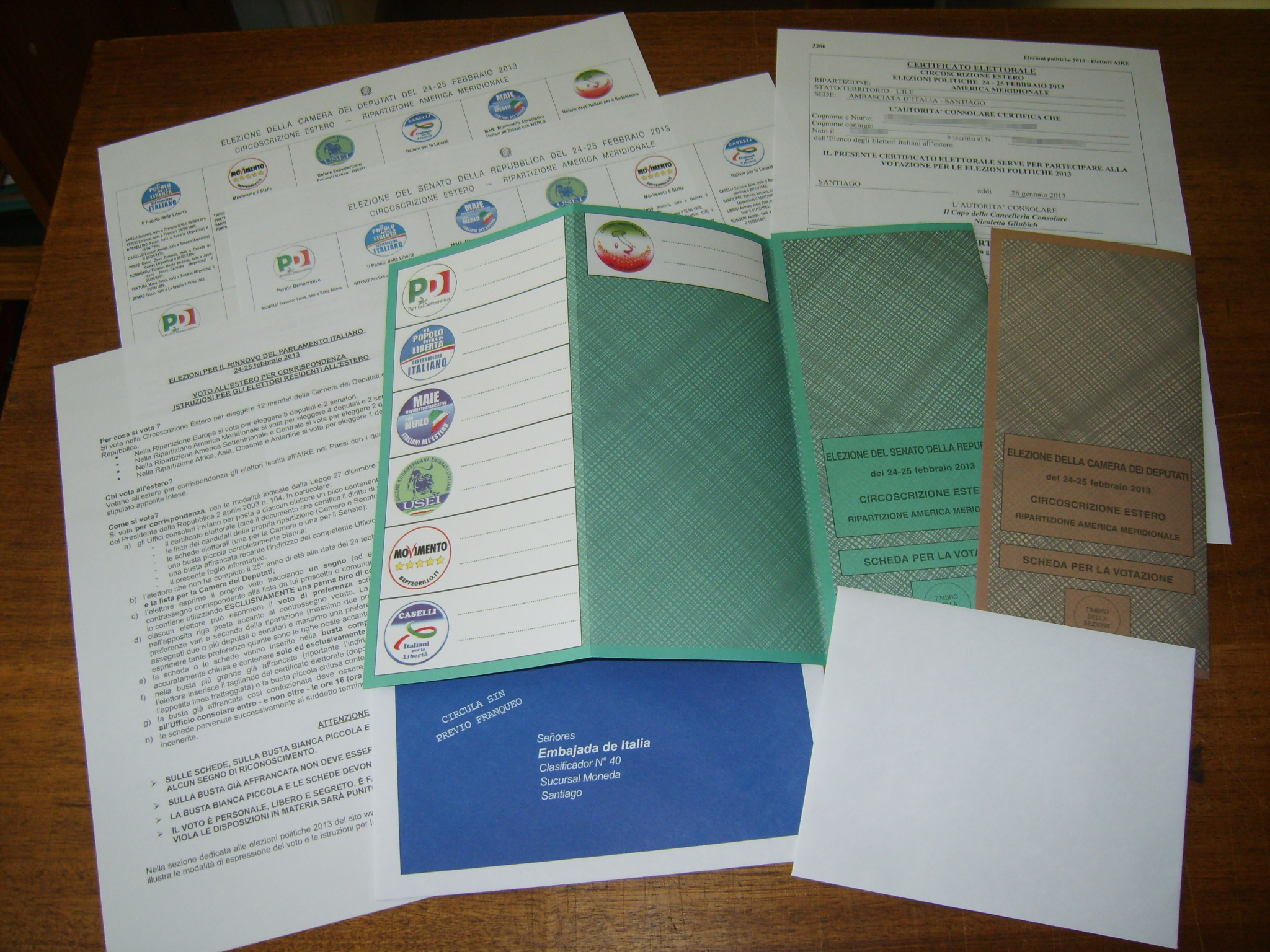 Paquete electoral enviado a un votante italiano en la circunscripción "América Meridional" para las elecciones generales de 2013.